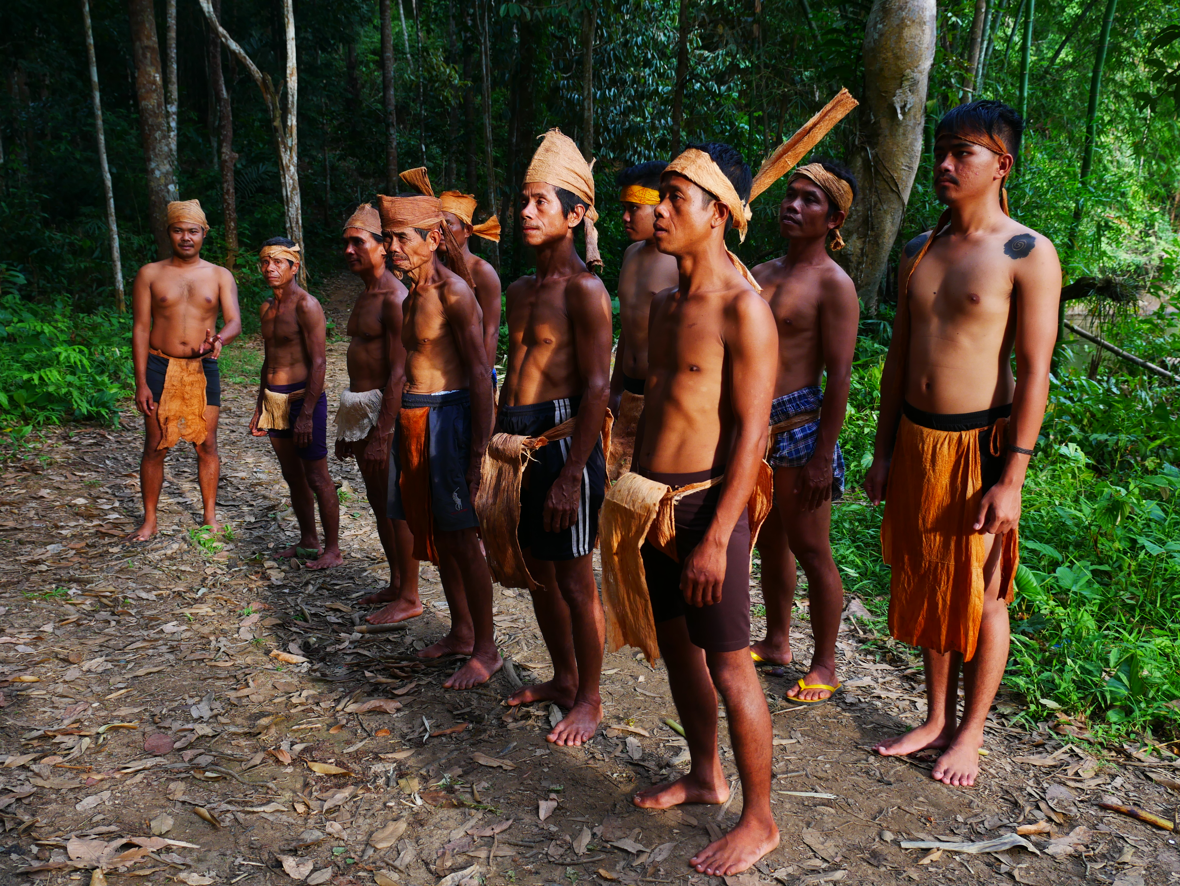 ini adalah foto para warga Dusun Bingal